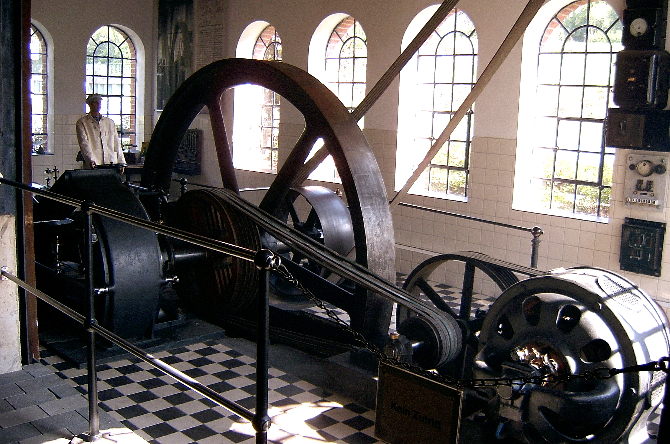 Dampfmaschine im Technikmuseum Freudenberg